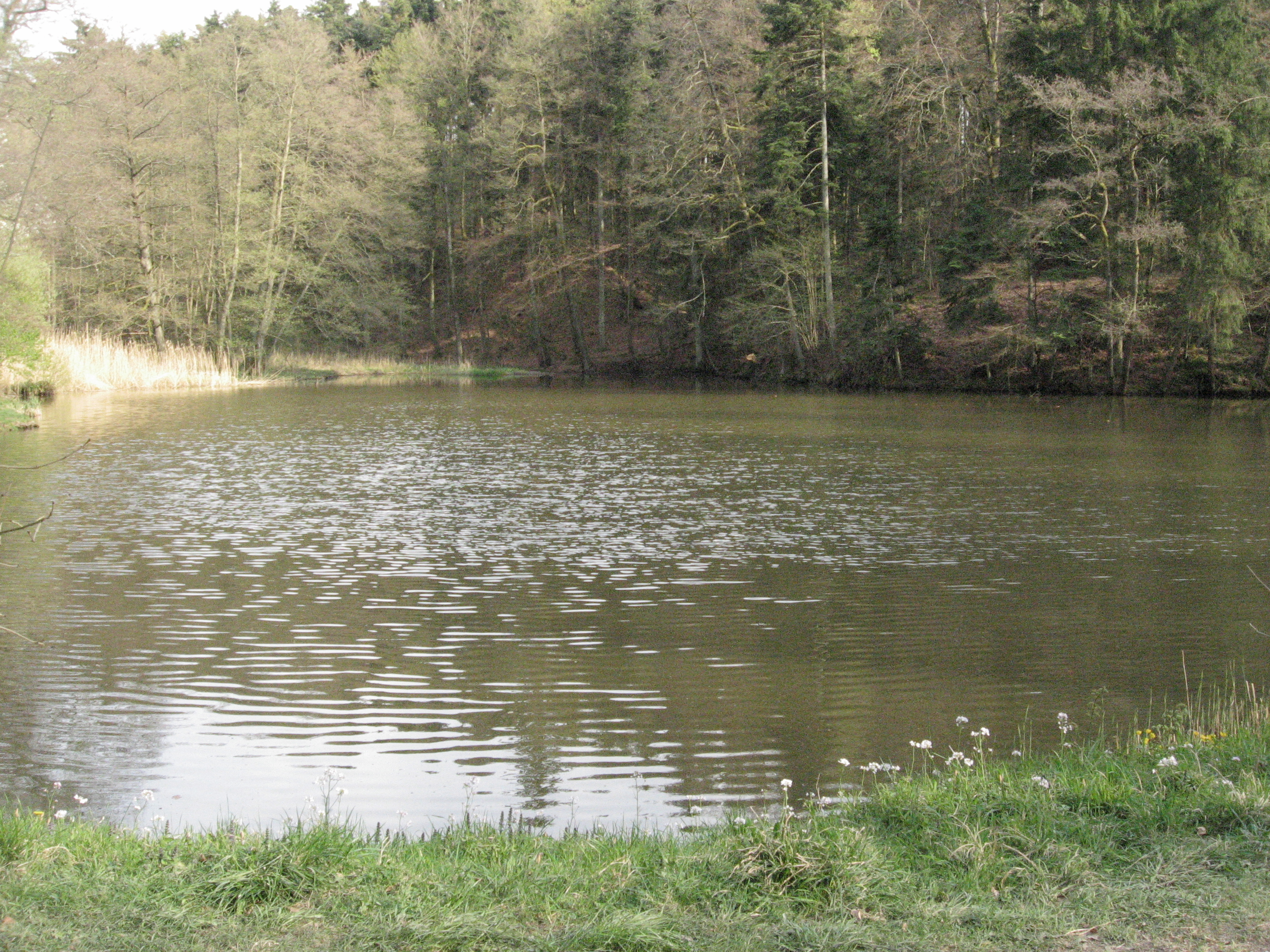 Der vom Schenkenbach durchflossene hintere Schenkensee in der Mörterklinge, die zwischen Frankenhardt-Markertshofen und Frankenhardt-Hinteruhlberg liegt. Hinter den Bäumen der kleinen Halbinsel im rechten oberen Teil des Bildes liegt der Hügel des Burgstalls Schenkensee.